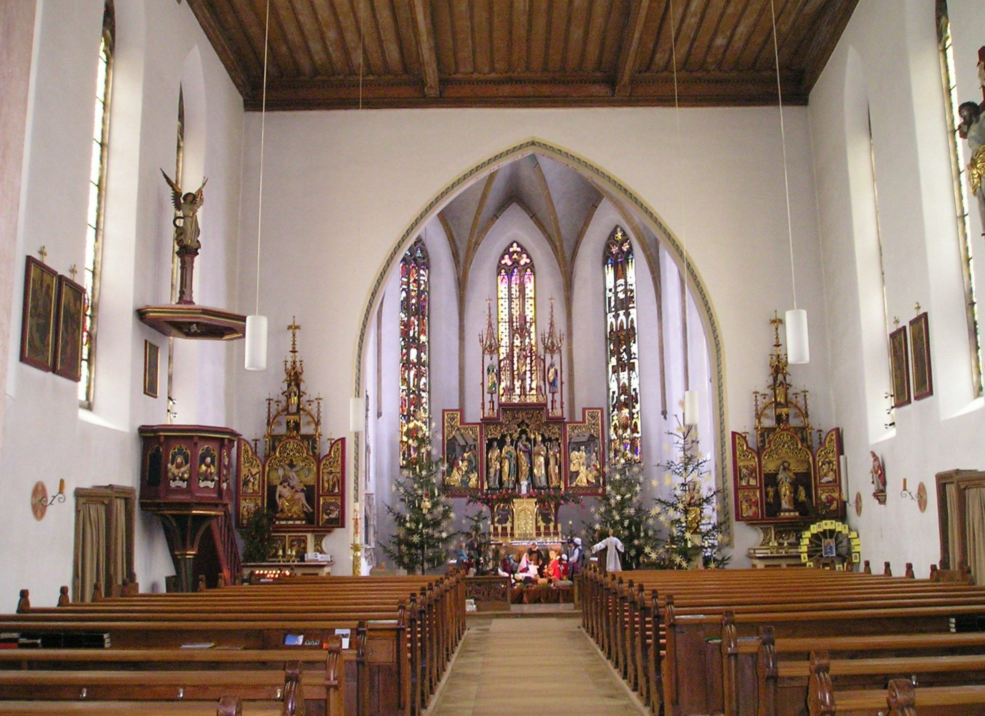 Pfarrkirche St. Sixtus in Pollenfeld (Landkreis Eichstätt), Inneres